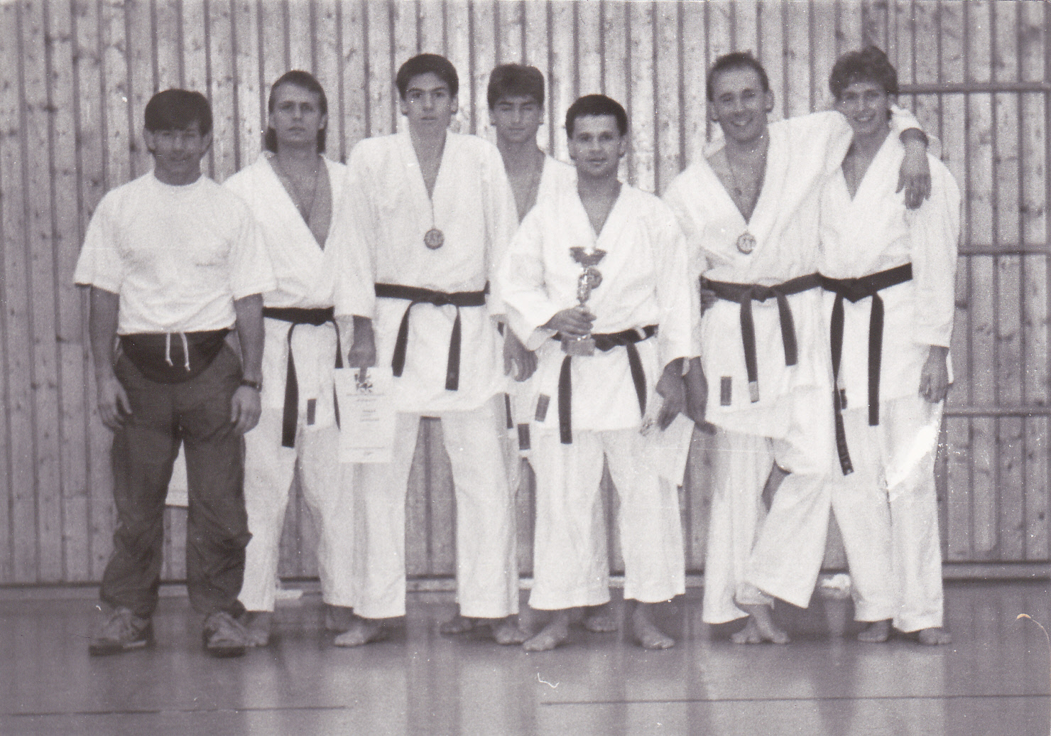 Bundesliga Mannschaft des KSD Rottenburg 1993